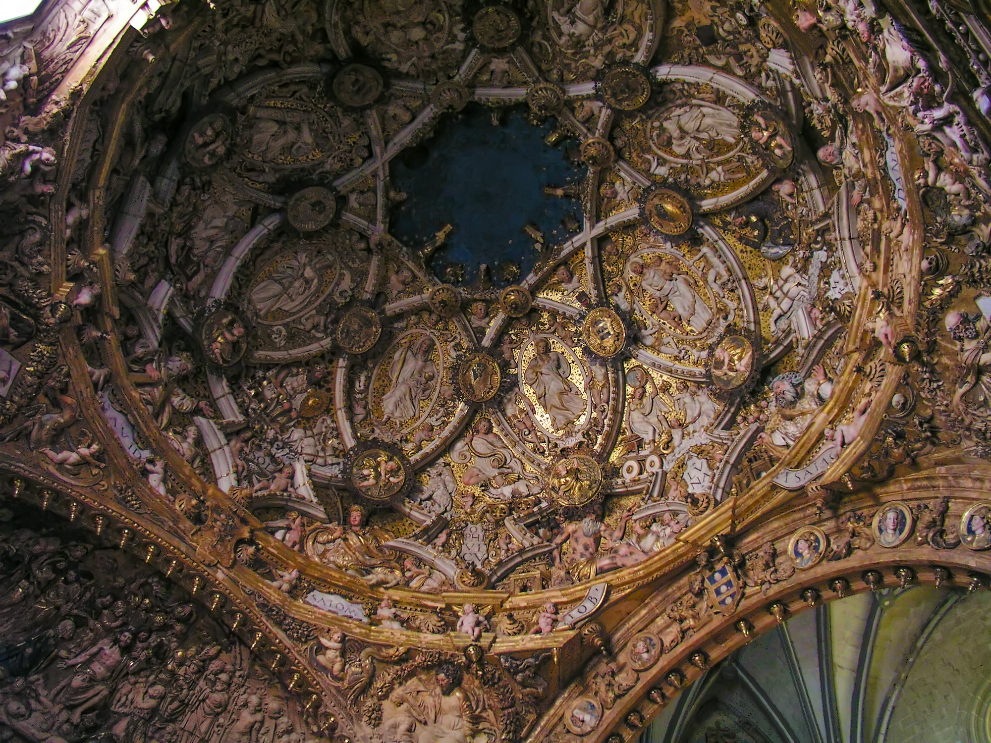 Detalle del techo, capilla de los Benavente, Iglesia de Santa María, Medina de Rioseco (Valladolid)